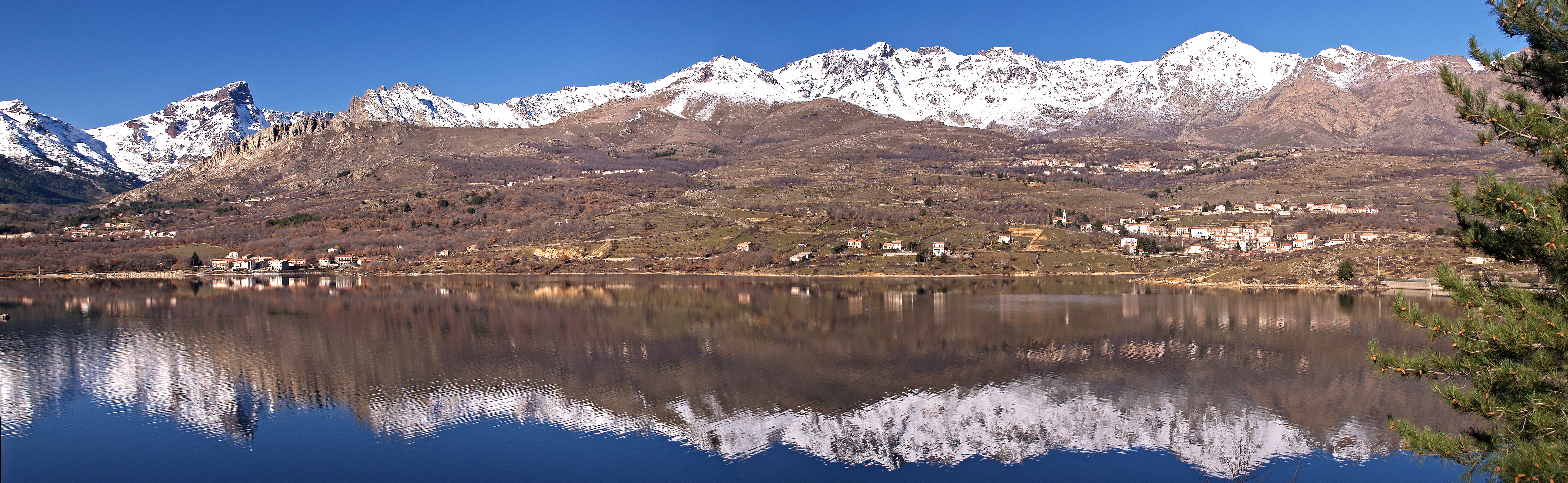 Calacuccia, lac de barrage, villages et montagnes. A gauche Paglia Orba, au milieu Monte Cinto.